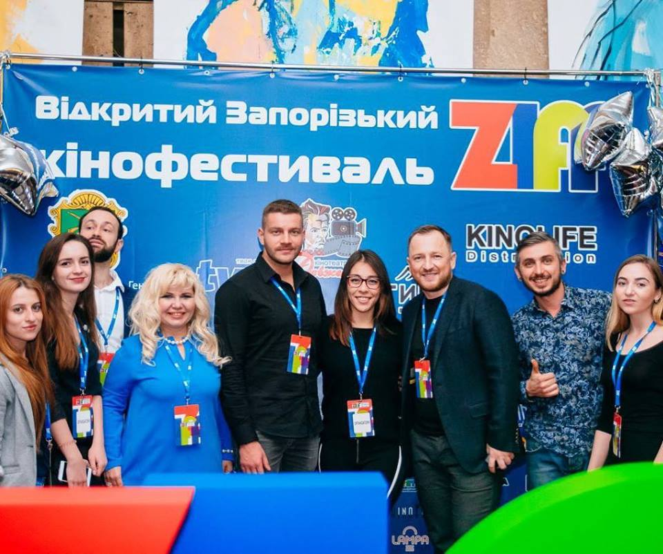 Жюри ZIFF